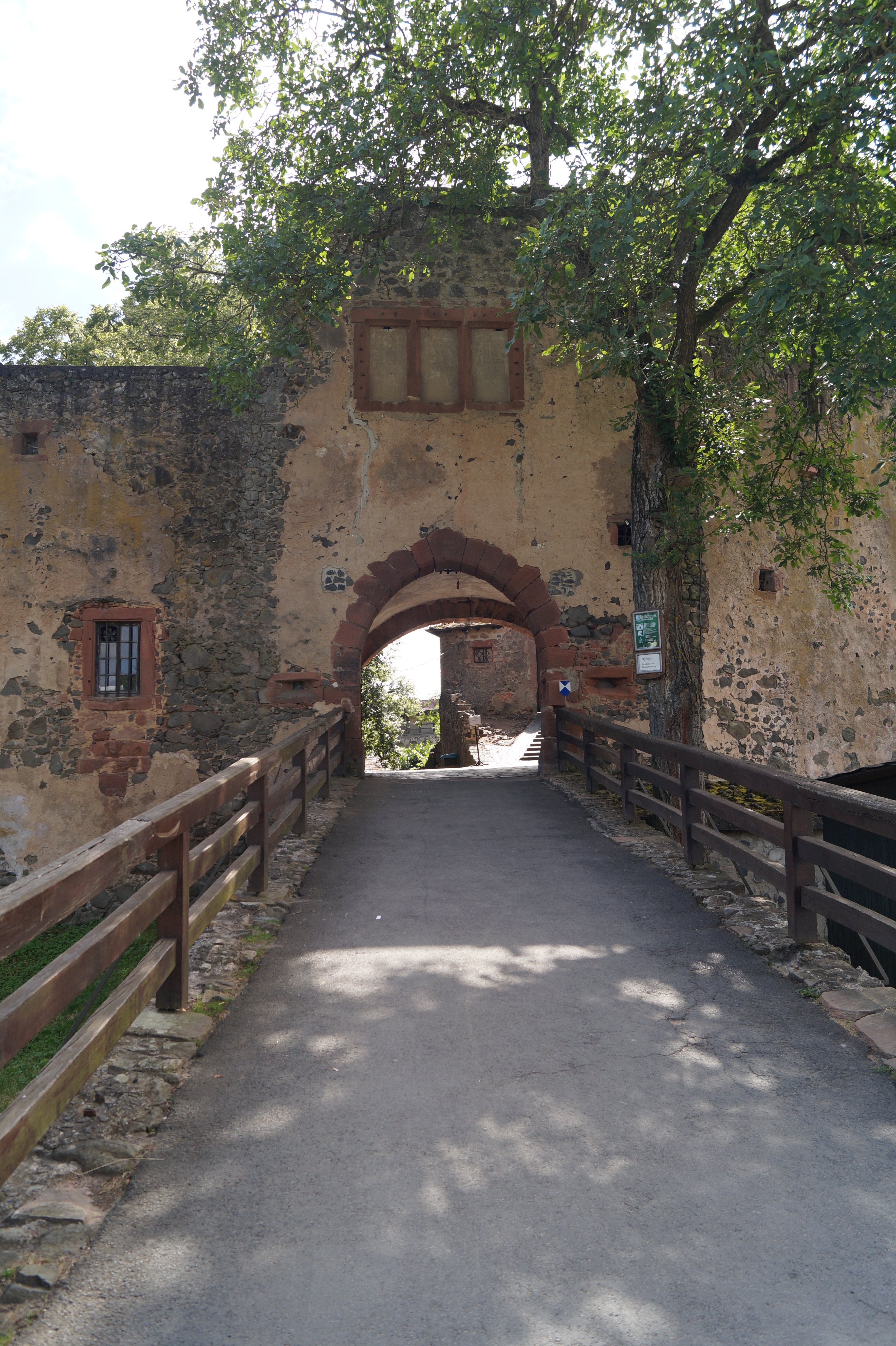 Burg Ronneburg, Hessen, Außenansicht des äußeren Torhauses.